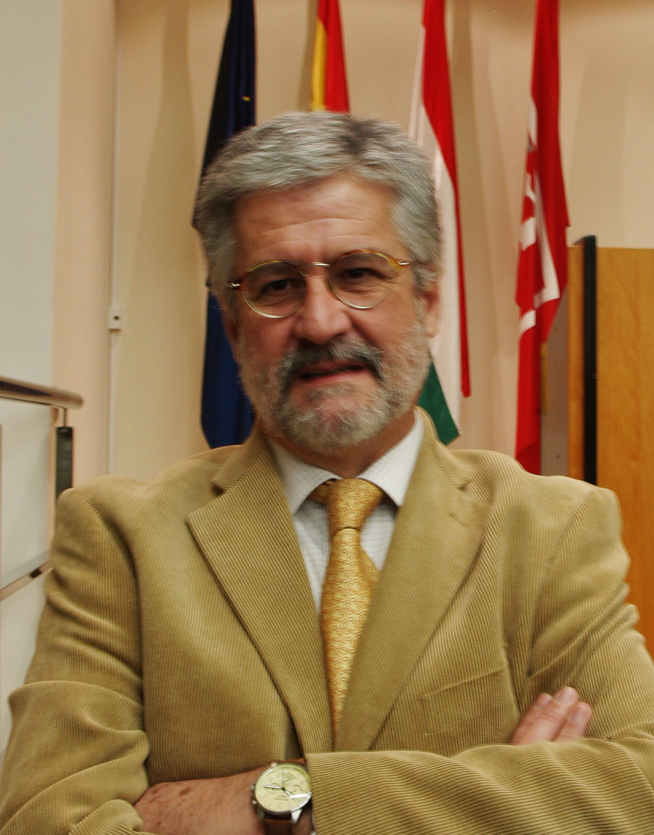 Immanuel Marín die 23 Novembris 2009